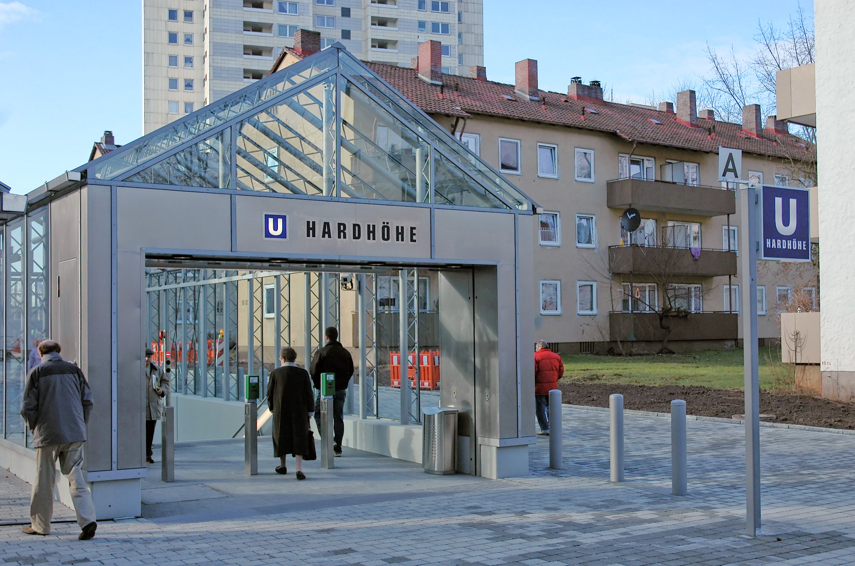 Eingang zur U-Bahnstation Fürth-Hardhöhe